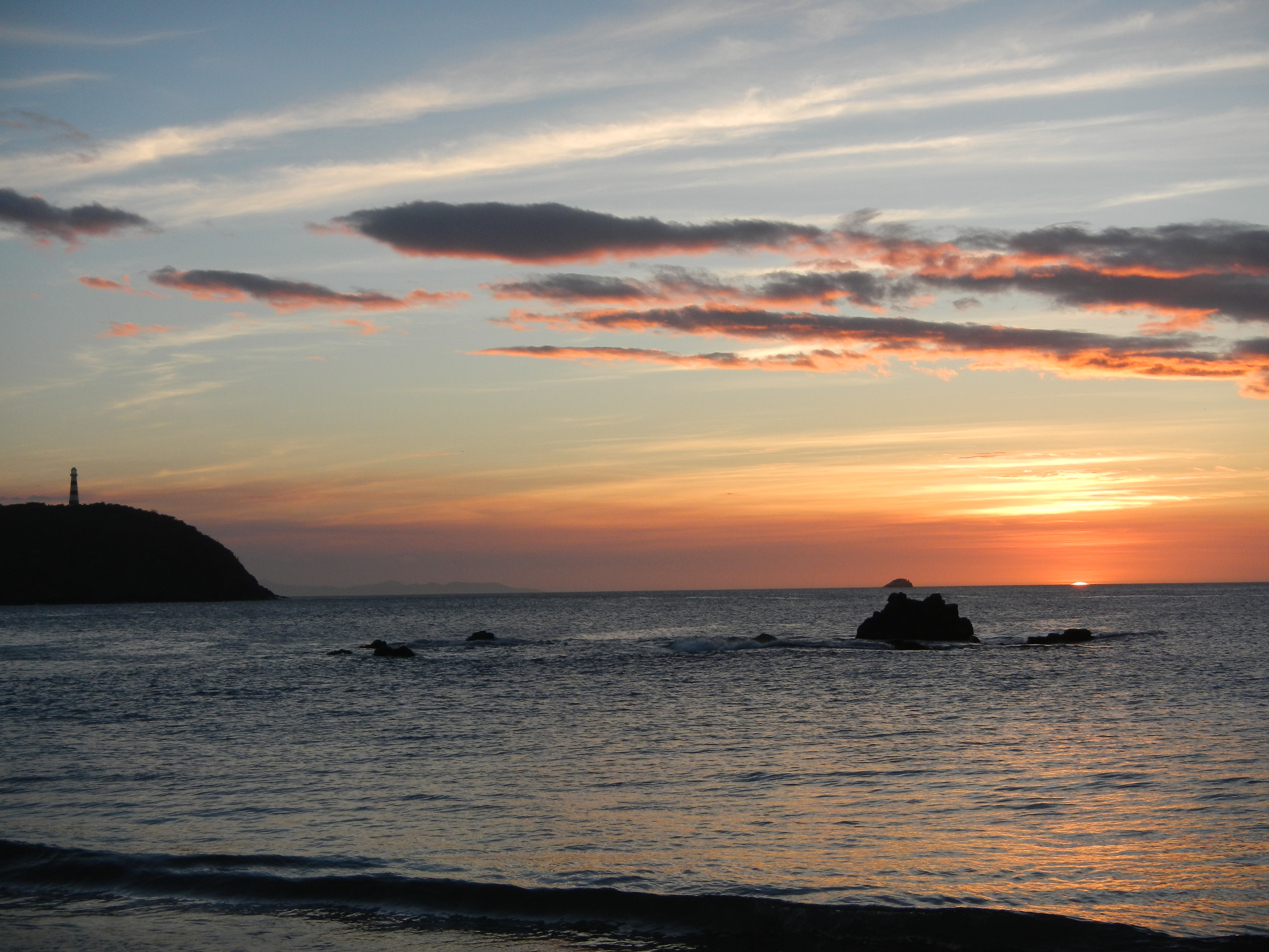 margarita playa puerto viejo